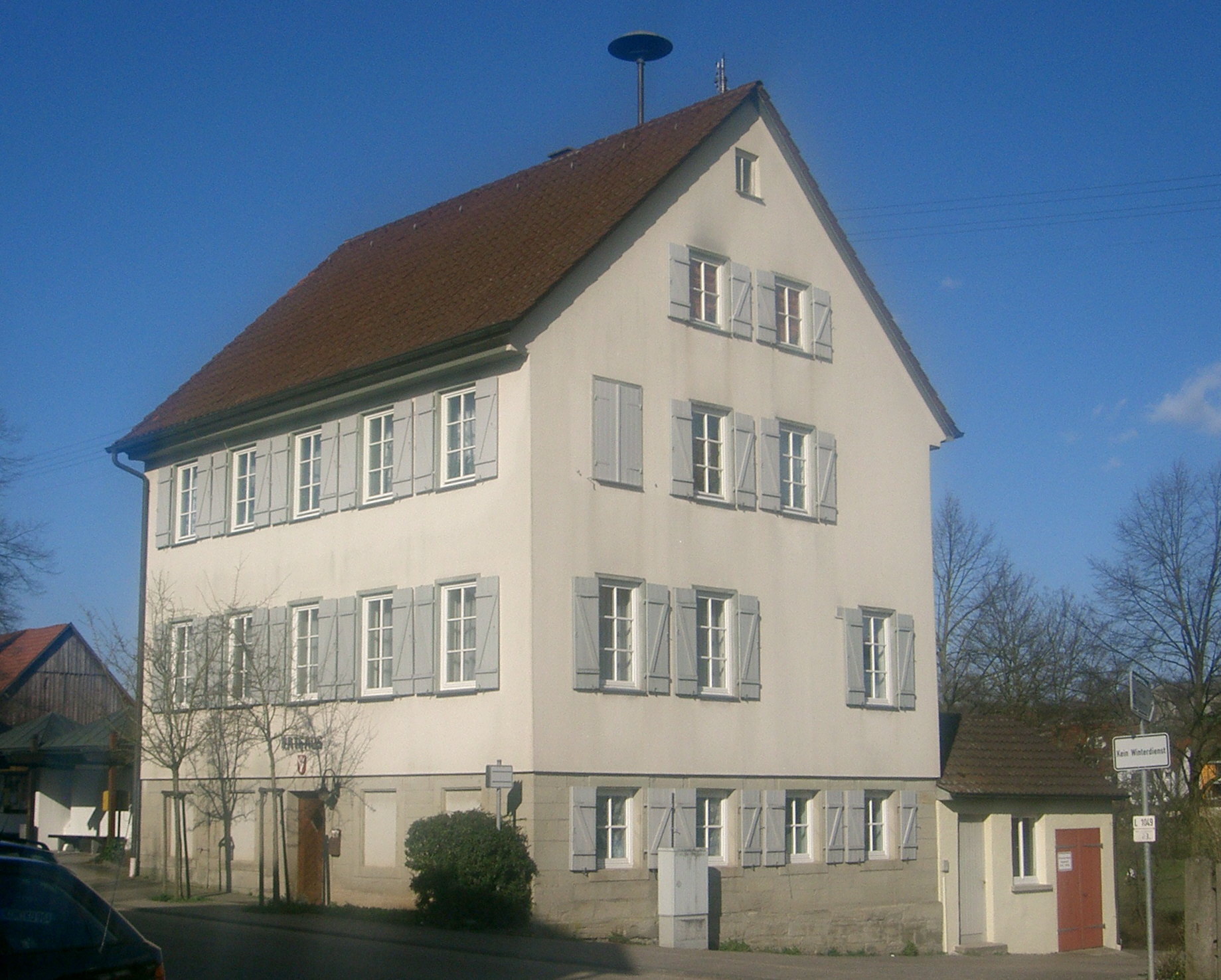 das ehemalige Rathaus in Oberohrn